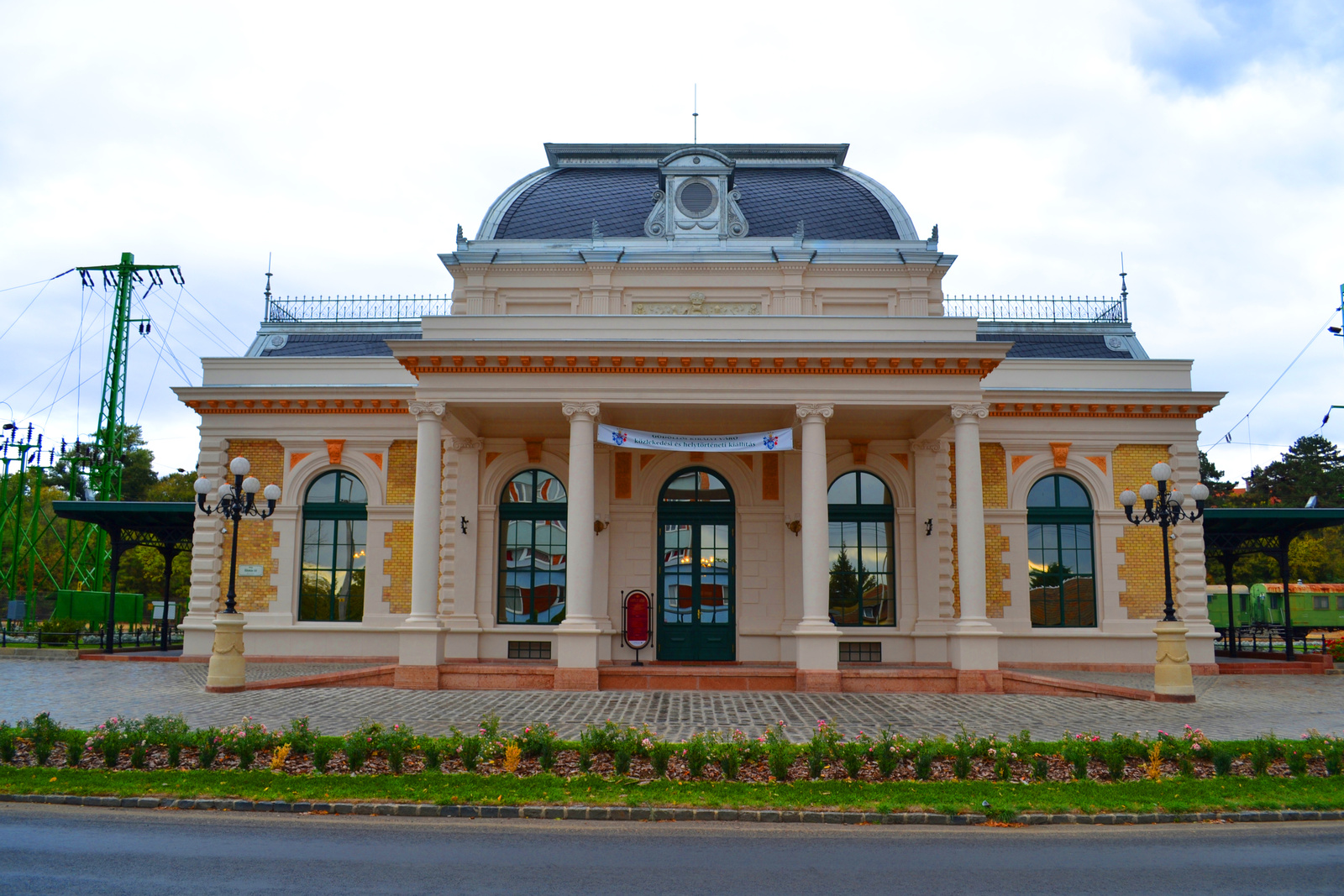 Királyi váróterem (Gödöllő, Állomás utca 1-2.) This is a photo of a monument in Hungary, Identifier: 7058